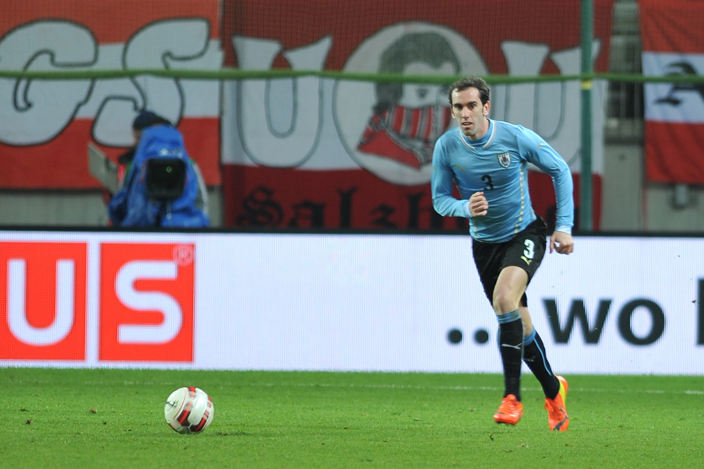 Freundschaftliches Länderspiel Österreich - Uruguay am 5. März 2014 in Klagenfurt: Diego Godín